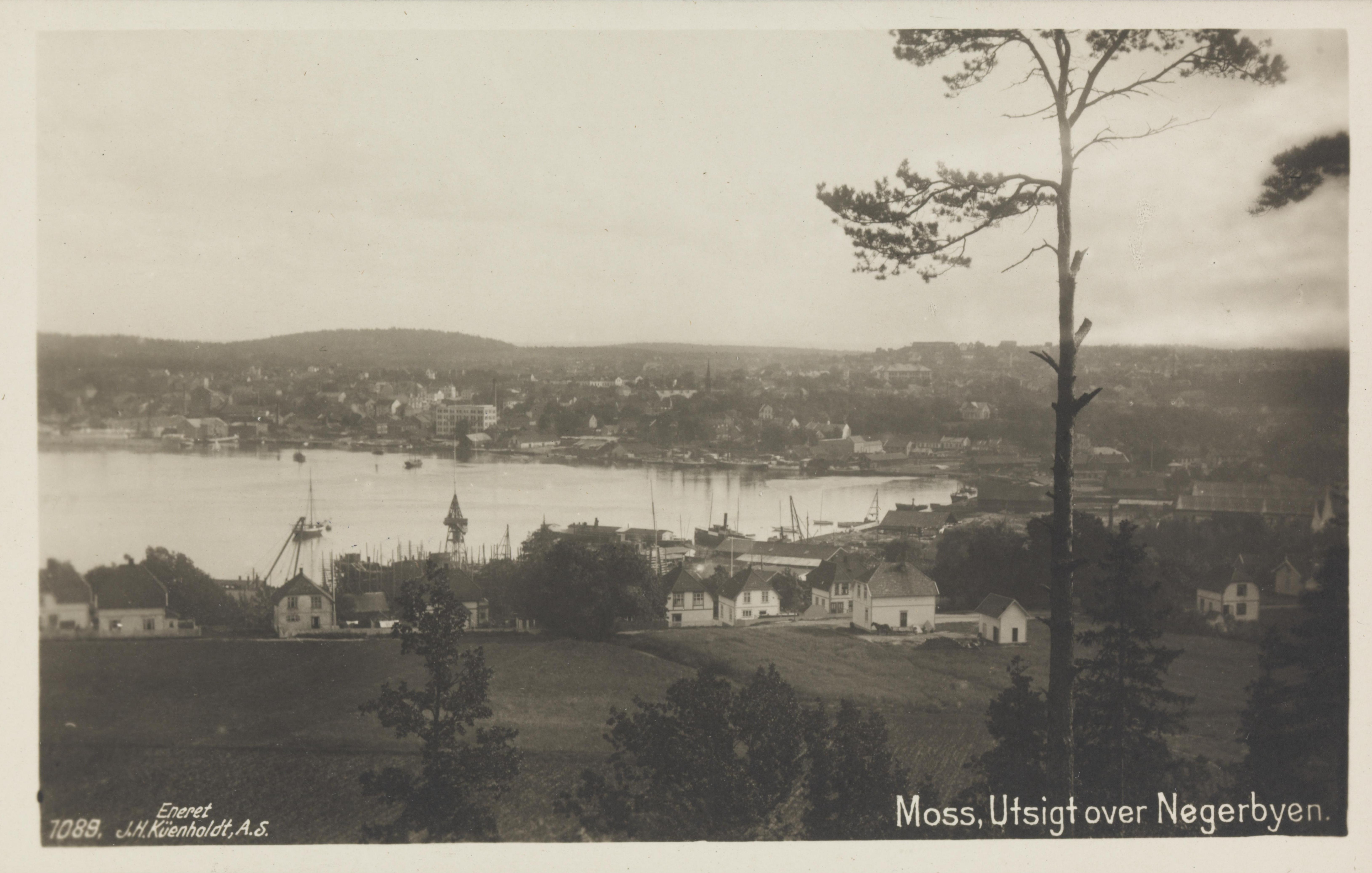 Bildet er hentet fra Nasjonalbibliotekets bildesamling Jeløya, Moss, Østfold